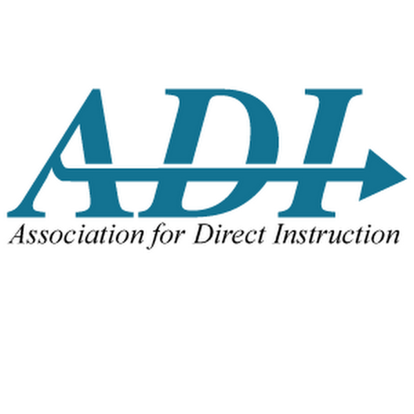 Association for Direct Instruction, Eugene, Oregon USA